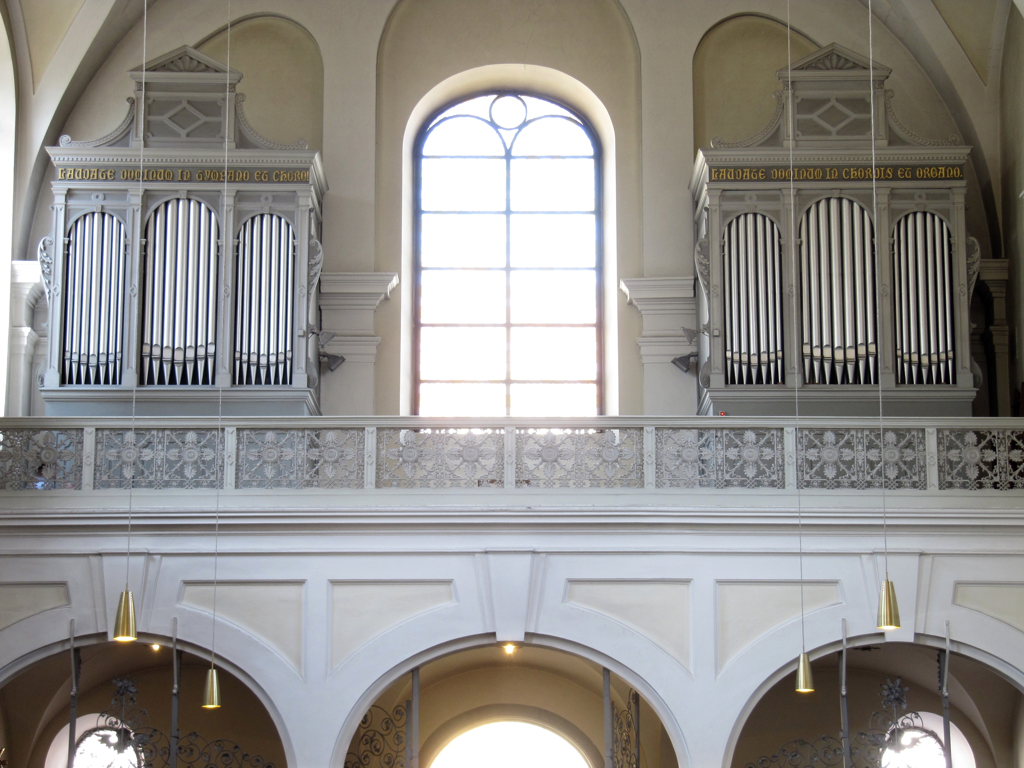 Orgel der ehemaligen Karmelitenkirche in Regensburg-Kumpfmühl, erbaut 1902 von Binder & Siemann II/17